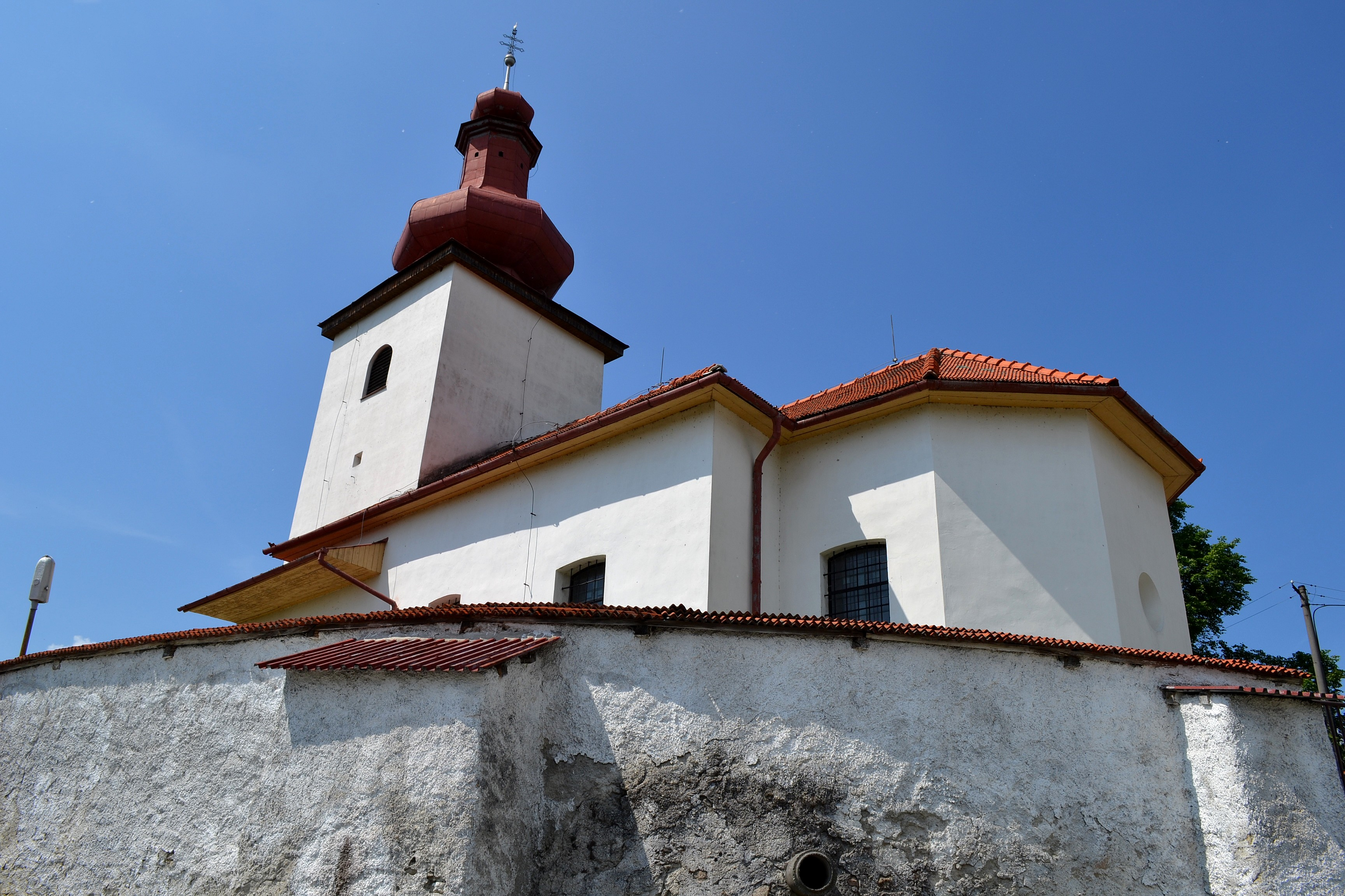 Slaská (okr. Žiar nad Hronom), Kostol svätého Gála